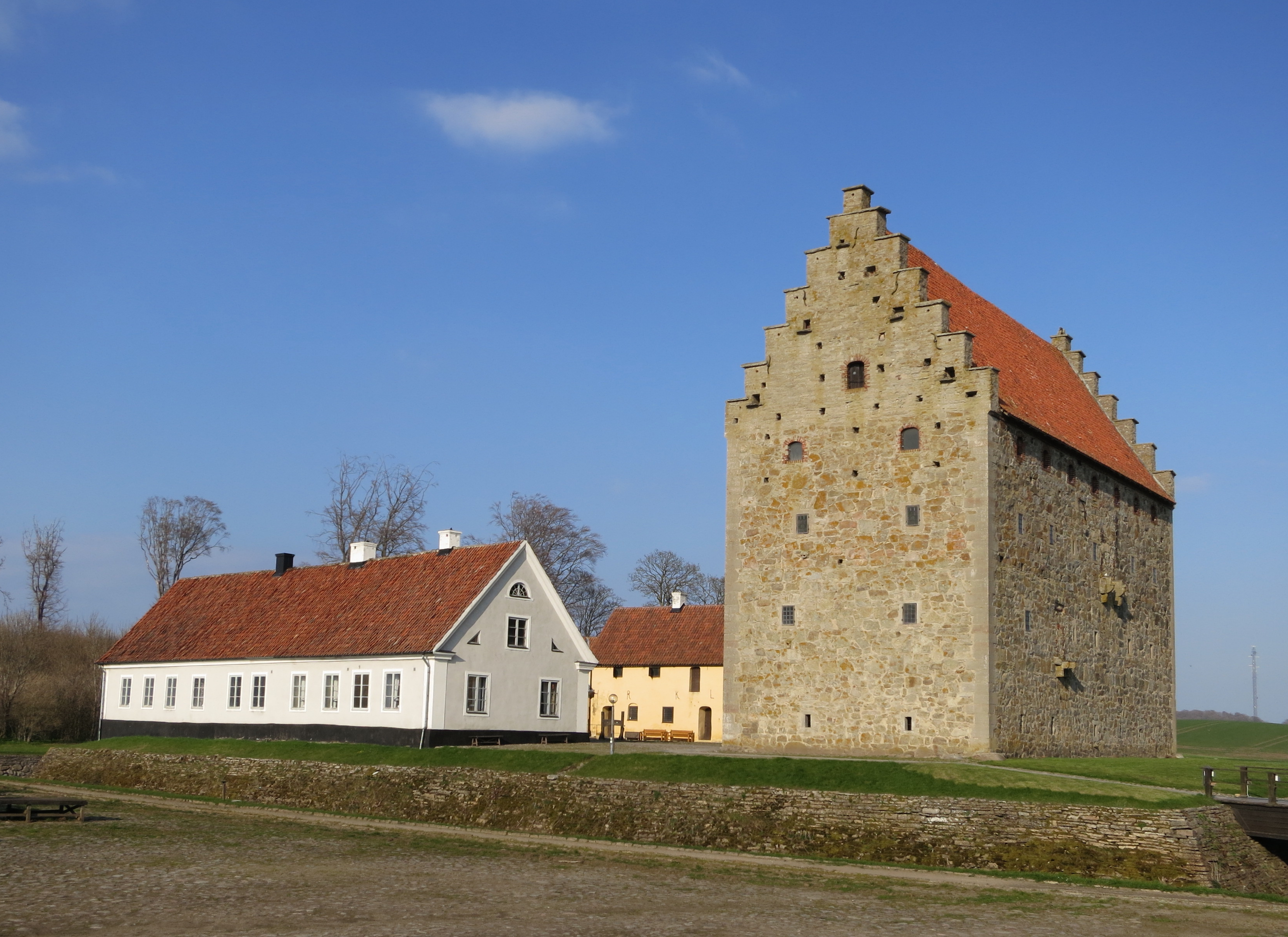 Glimmingehus 2013